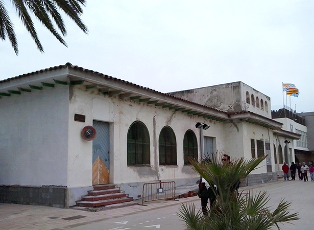 Antiga llotja de pescadors (esquerra) i Club Natació Badalona (dreta), des del passeig.